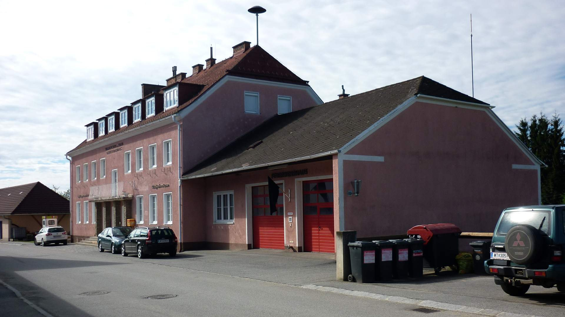 Waldkirchen a .d. Thaya - Rathaus